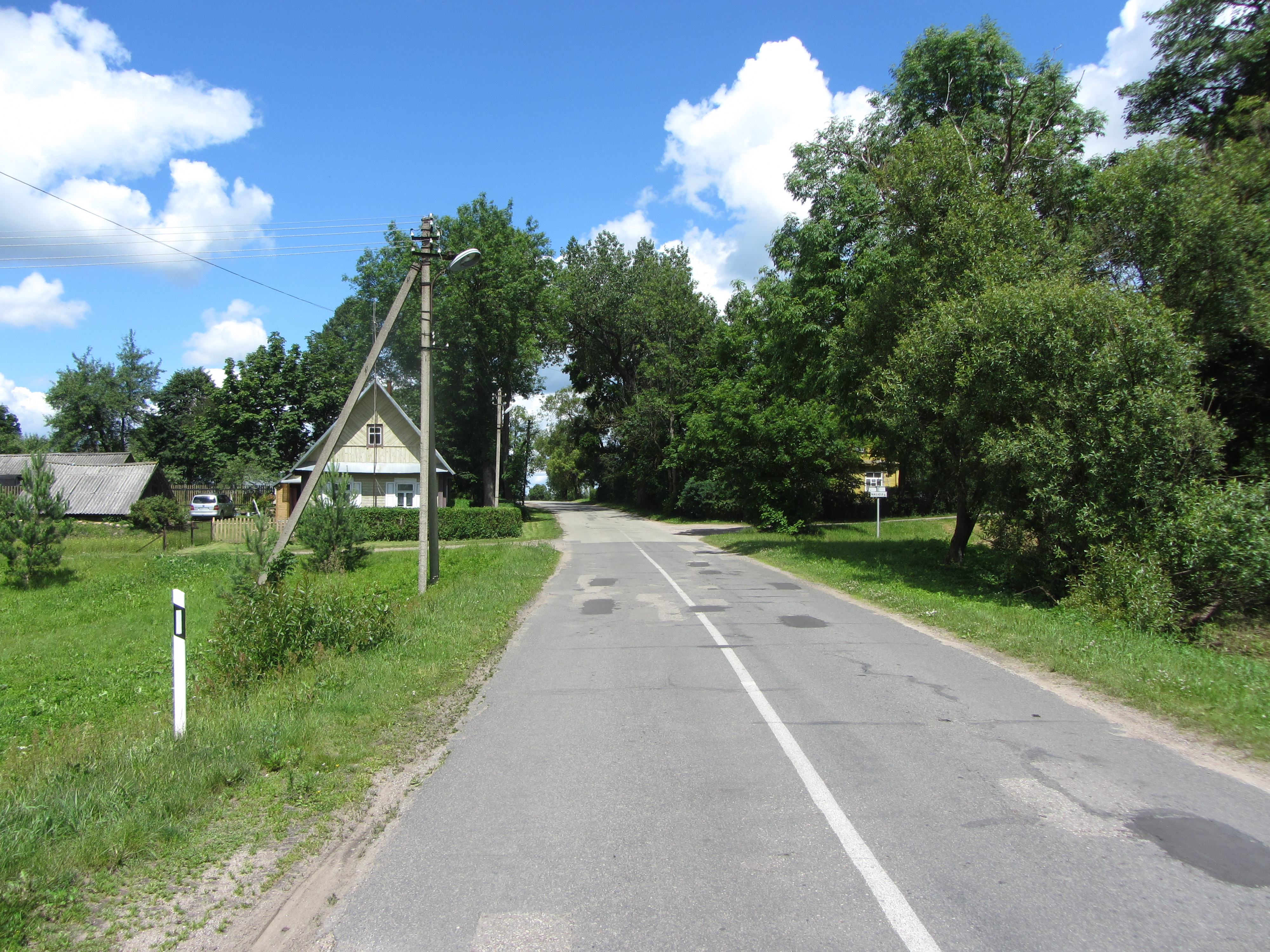 Naujas Strūnaitis, Lithuania